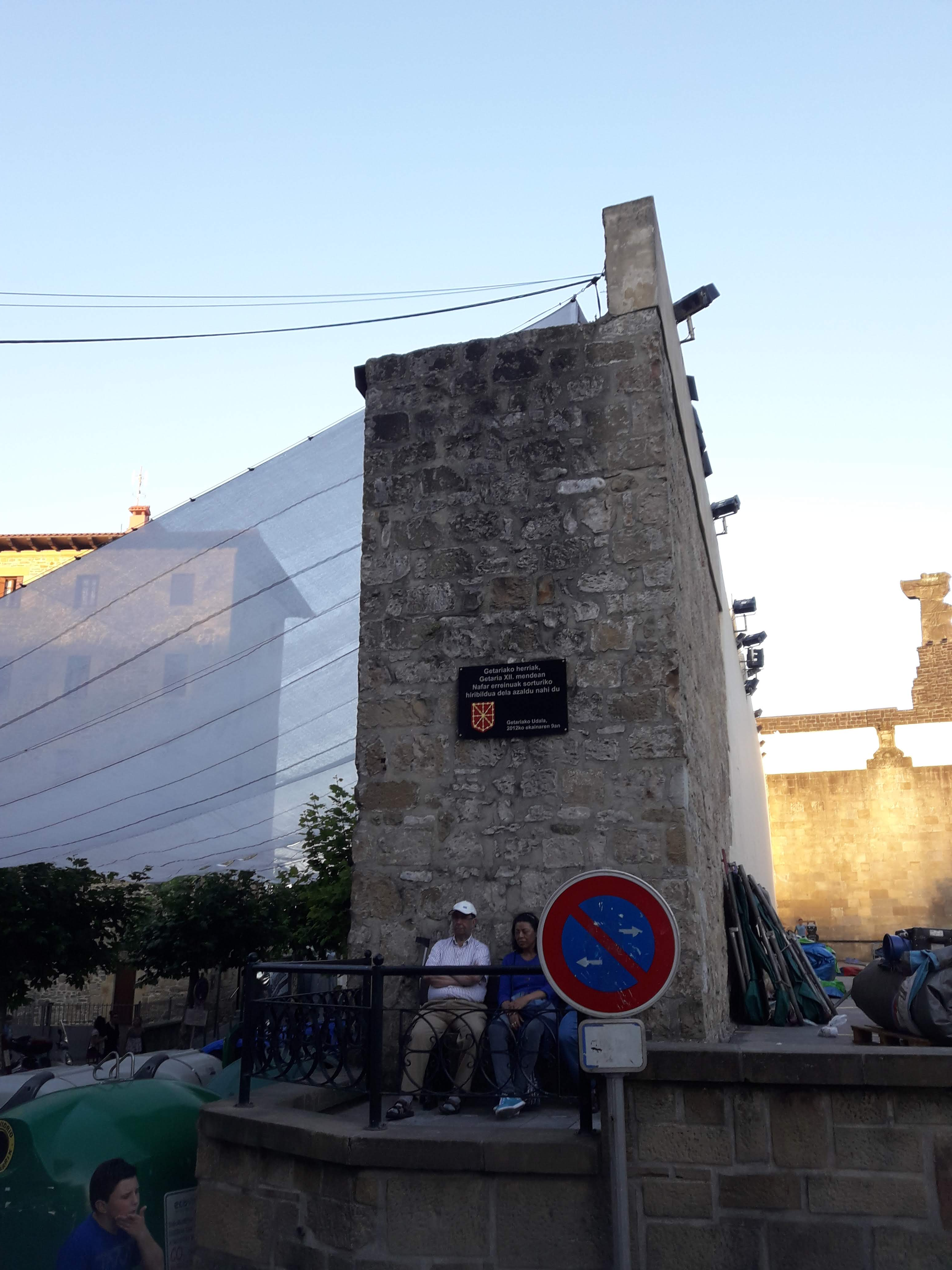 Getaria. Antiga muralla.